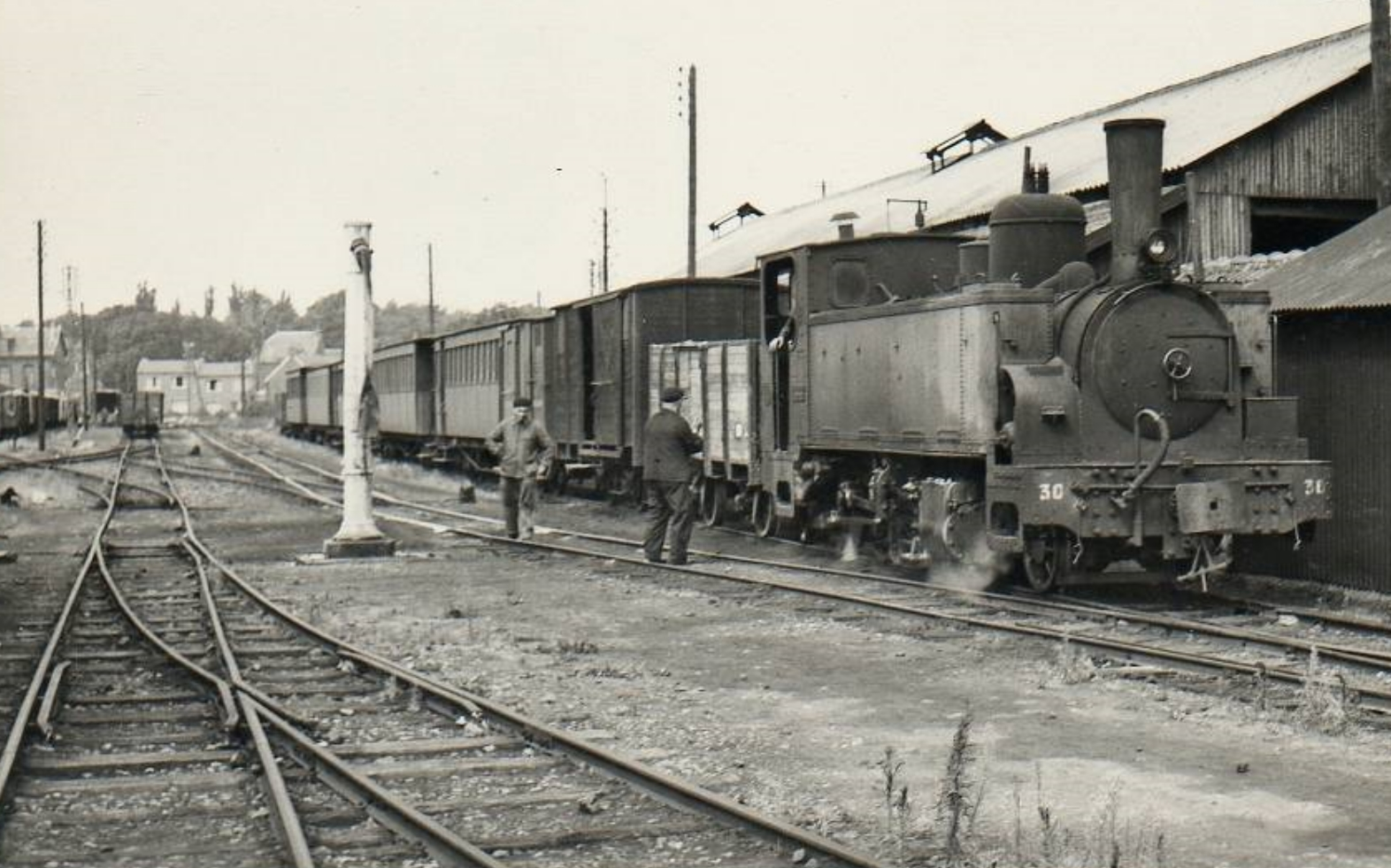 Gare des Chemins de fer du Cambrésis à Caudry, Nord, Nord-Pas-de-Calais, France.